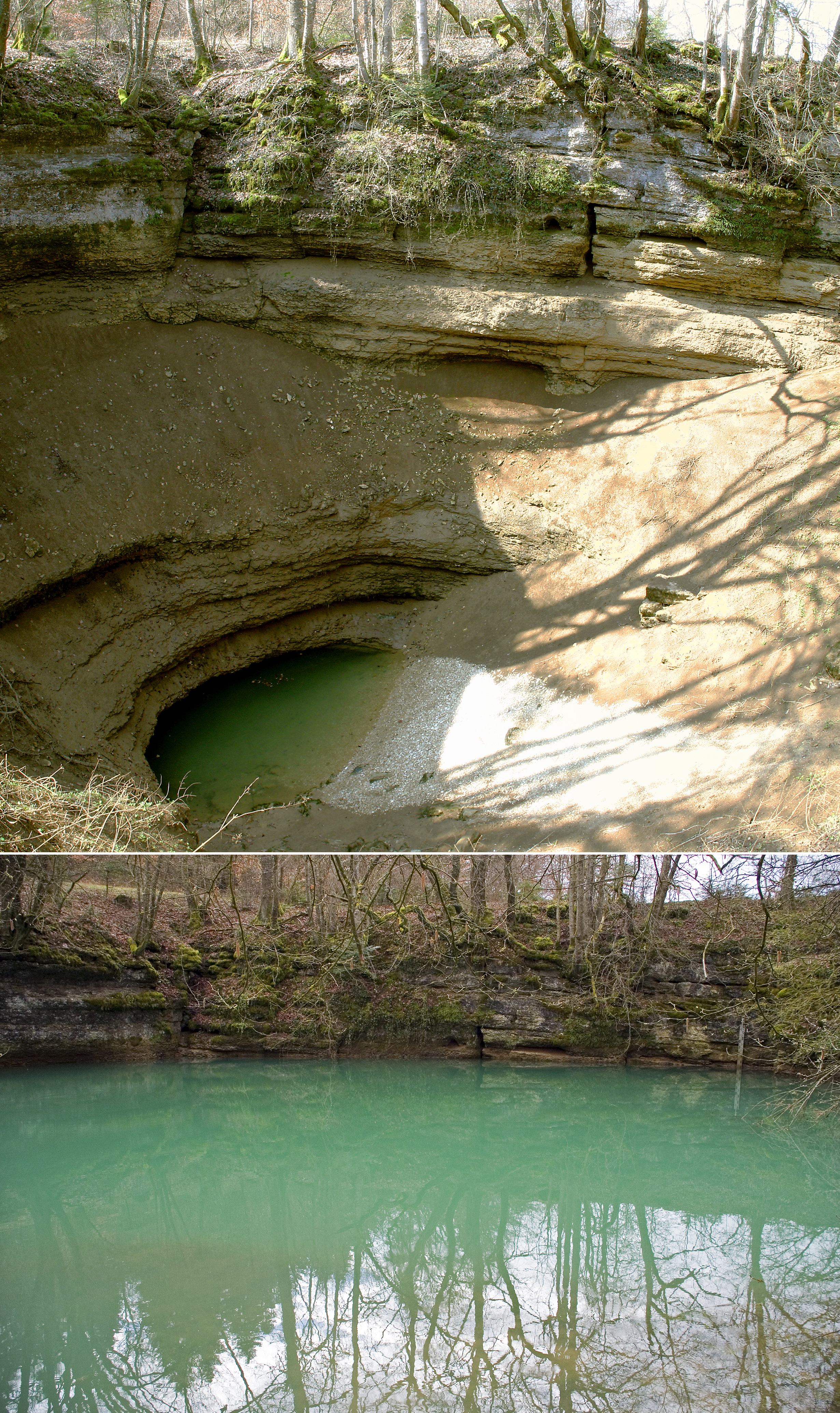 Creux-Genat, eine intermittierende Karstquelle zwischen Chevenez und Porrentruy in der Ajoie, am 2.4.2005 und am 17.4.2006 aufgenommen.